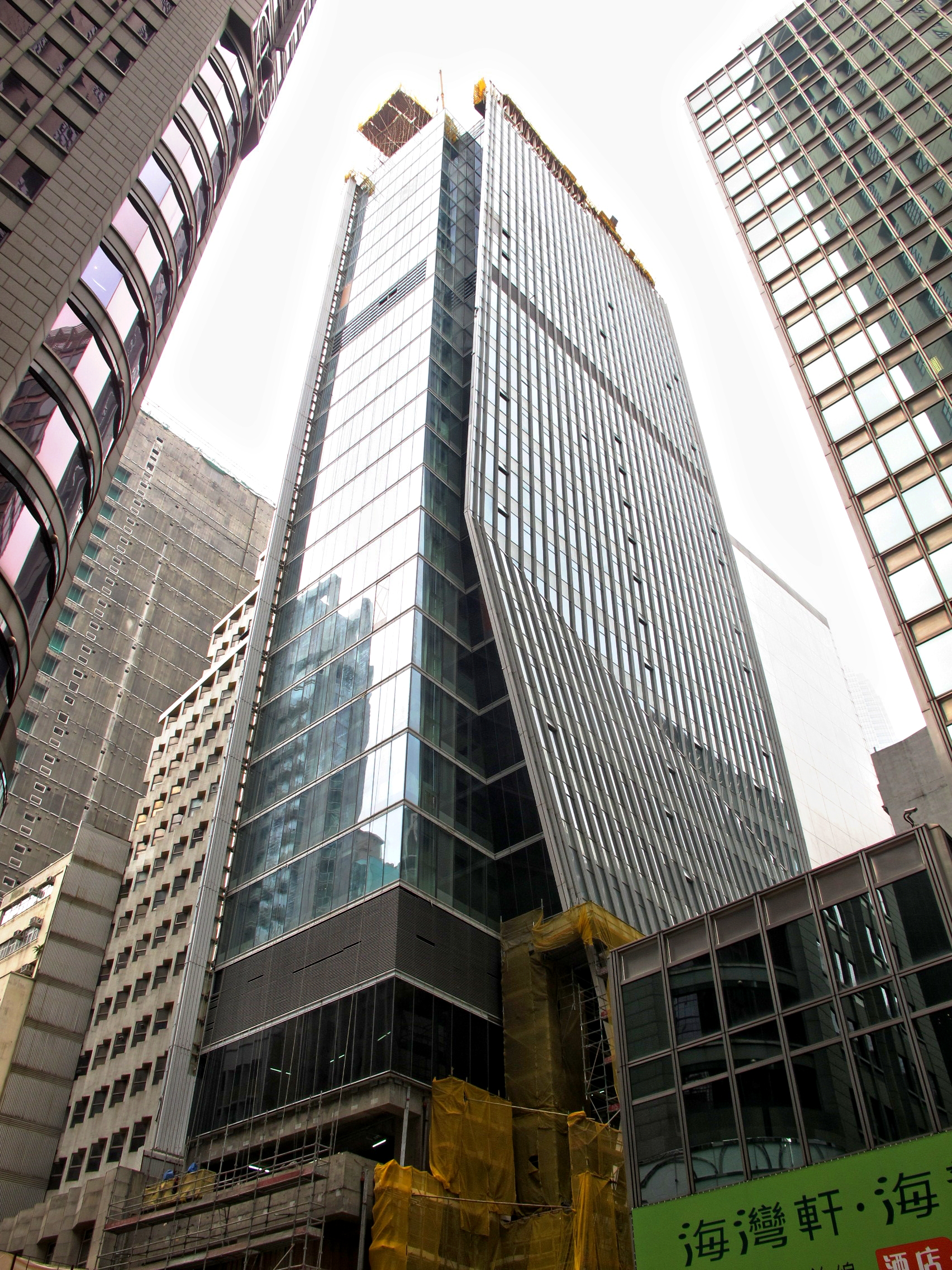 2nd generation Luk Hoi Tung Building